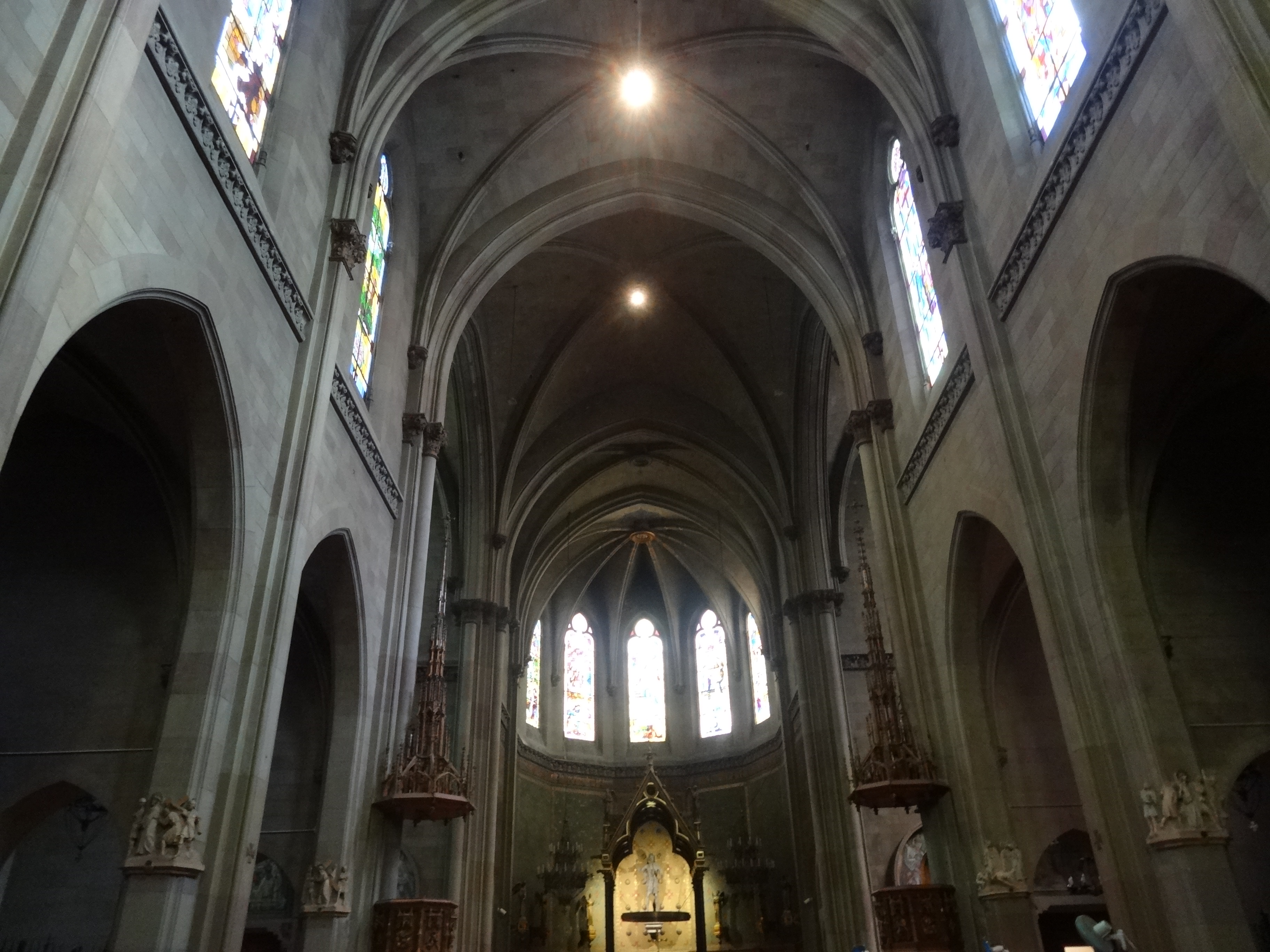 Església de Sant Joan d'Horta (carrer Campoamor, barri d'Horta, Barcelona).